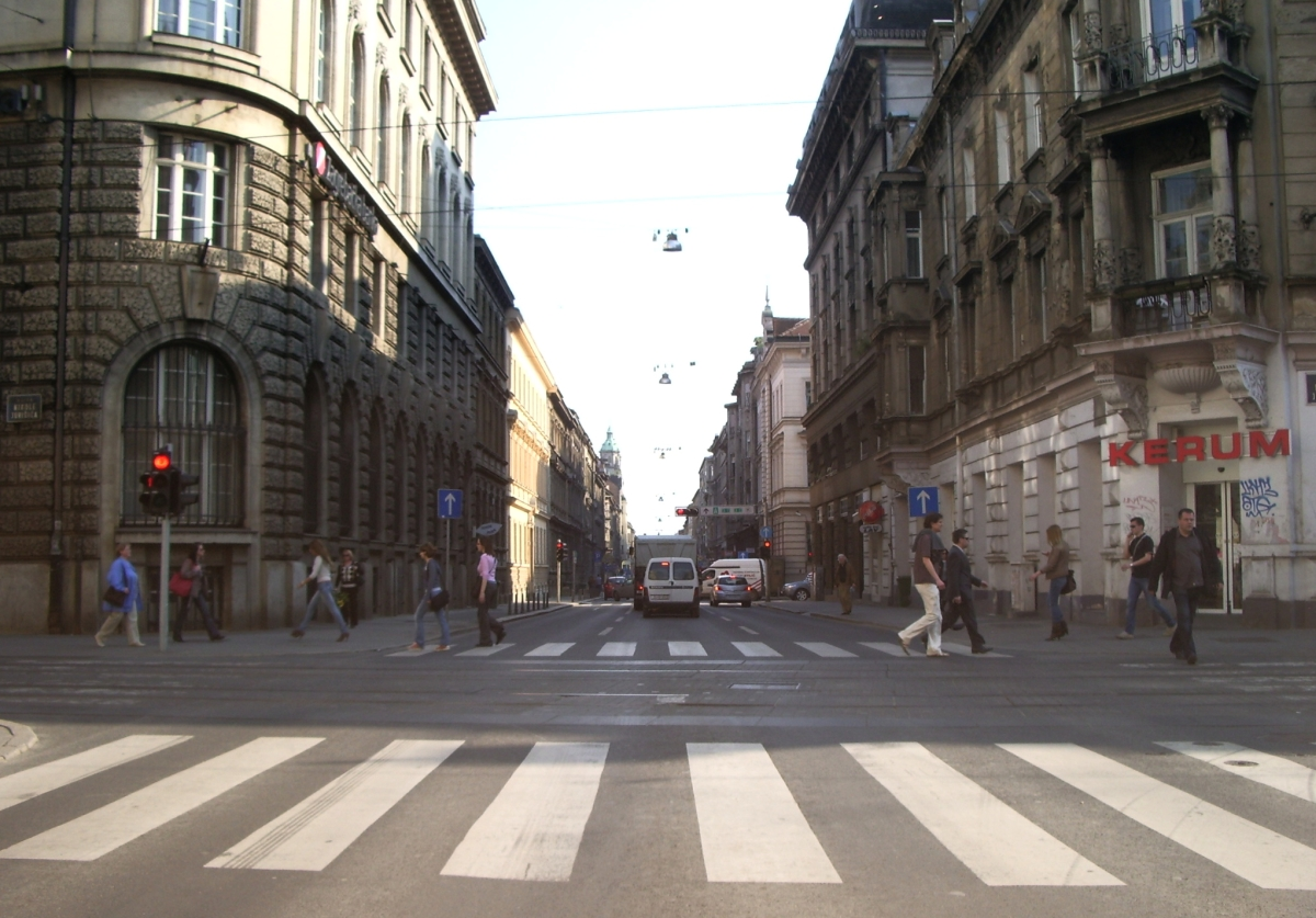 Palmotićeva ulica u Zagrebu